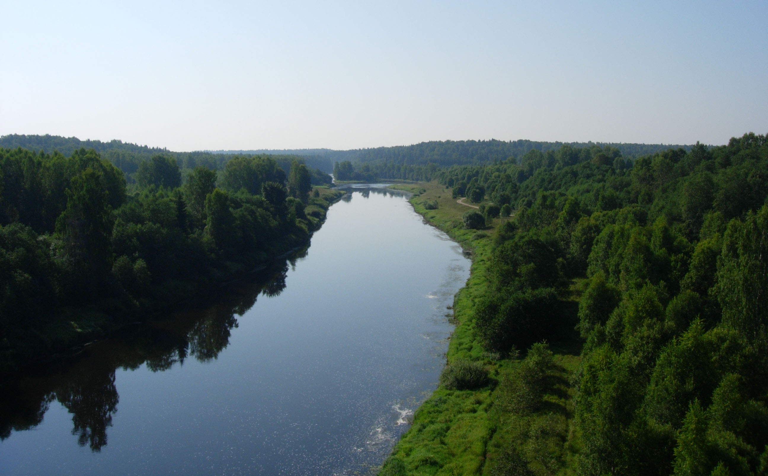 Вид на Волгу с Климовского моста